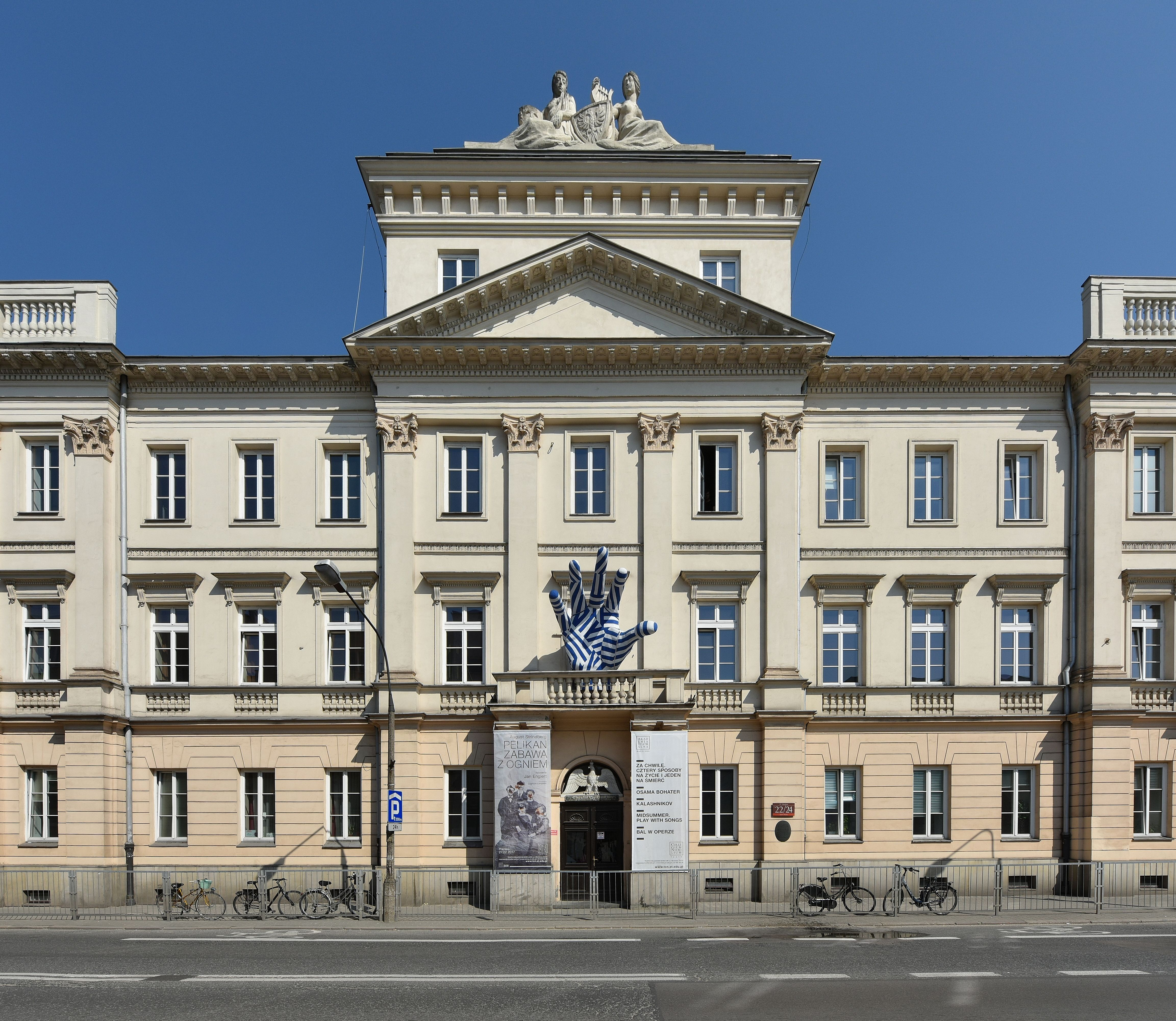 Akademia Teatralna im. Aleksandra Zelwerowicza w Warszawie